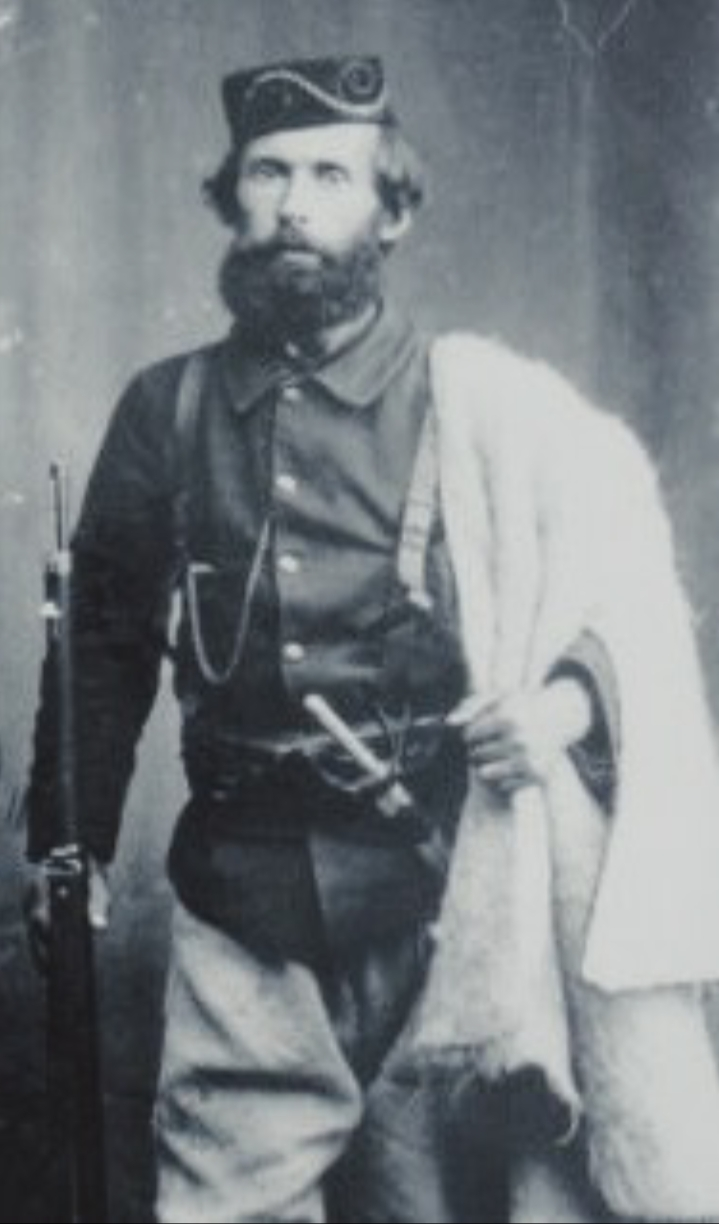 Mihal Grameno Ulusal Kiyafeti ile